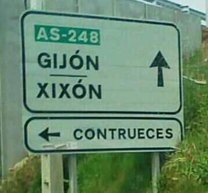 sign bilingual gijon-xixon